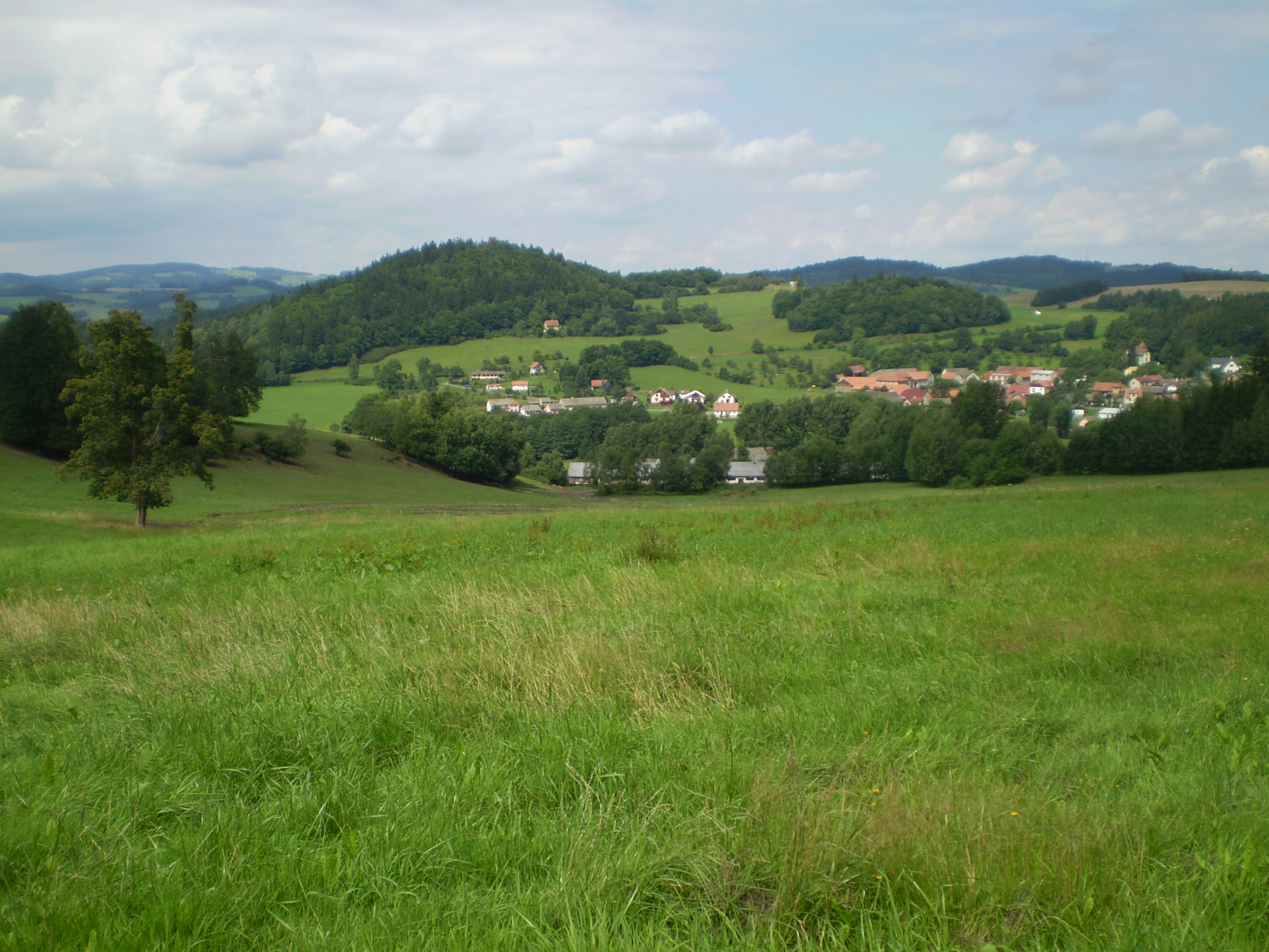 Kopec Hůlkovice a vesnice Čtyři Dvory, Českomoravská vrchovina